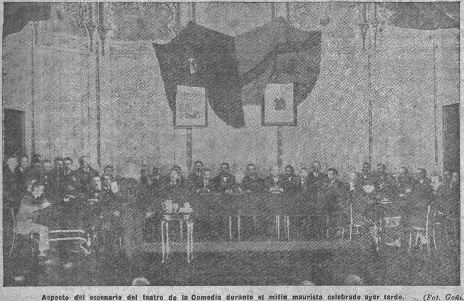 Mitín maurista en el Teatro de la Comedia. Fot. Goñi